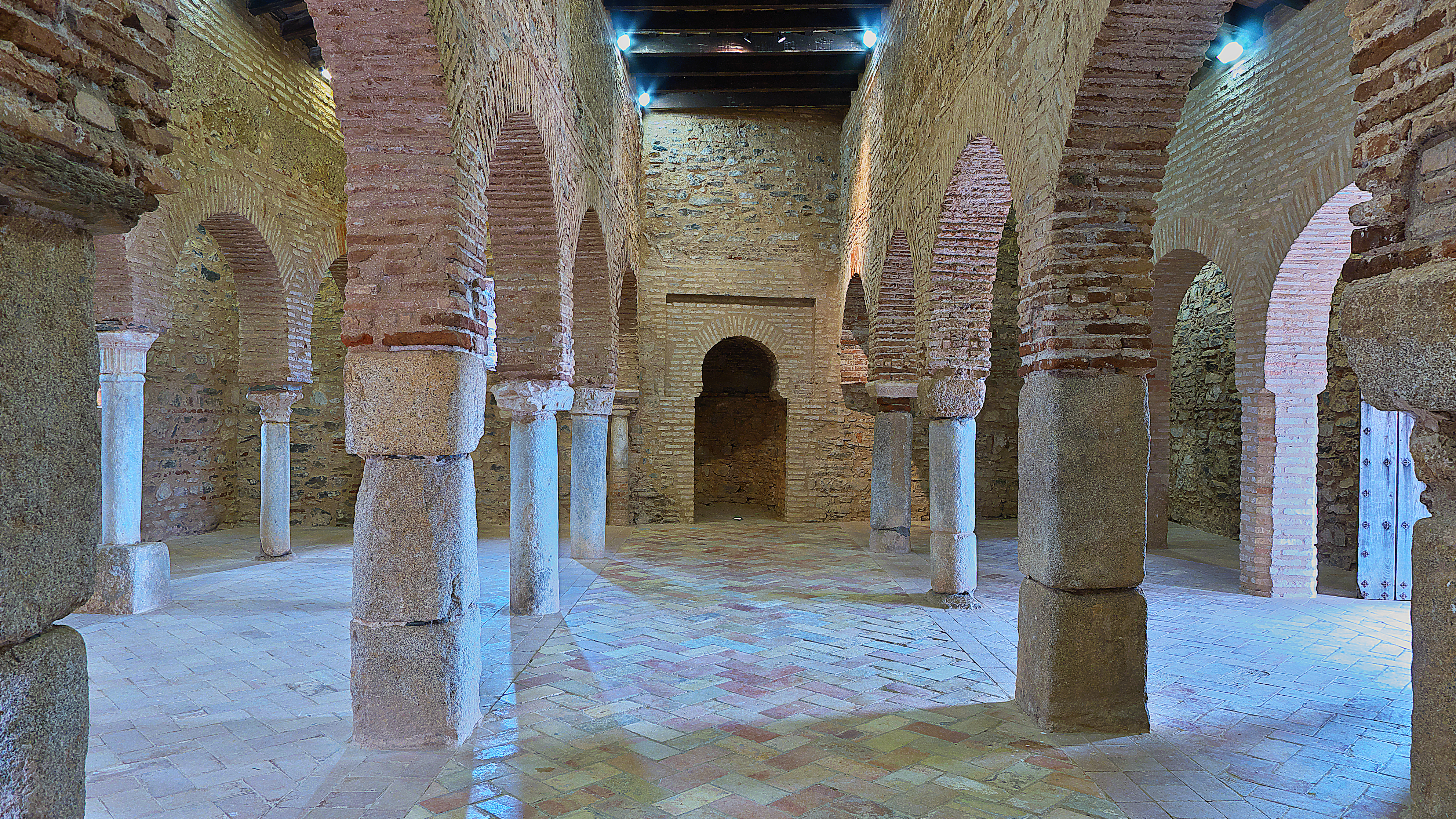 La sala de oración de la mezquita omeya. Posiblemente instituida por el emir ‘Abd al-Raḥmān III.